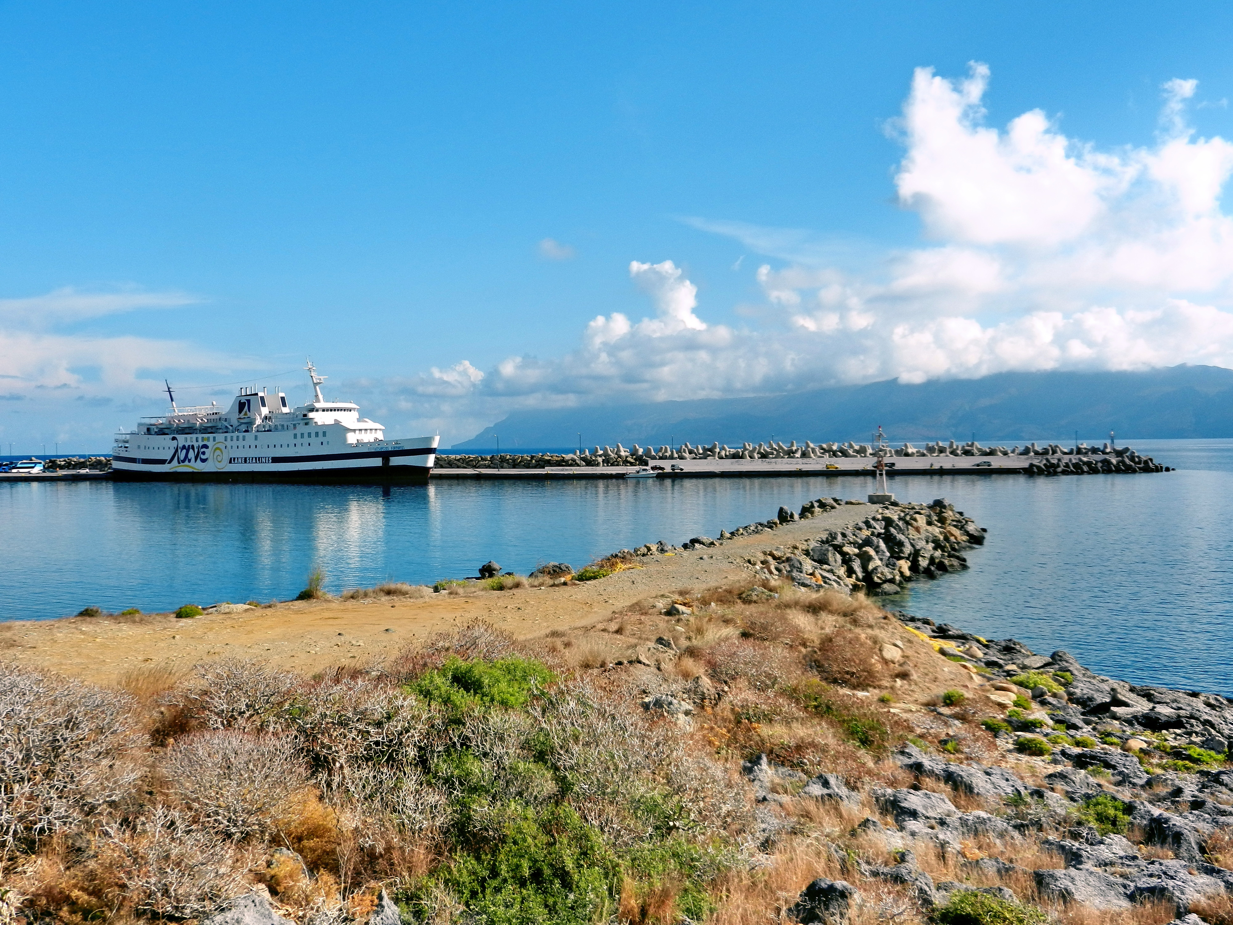 Kissamos